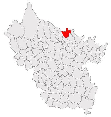 Categorie:Hărţi ale judeţului Buzău